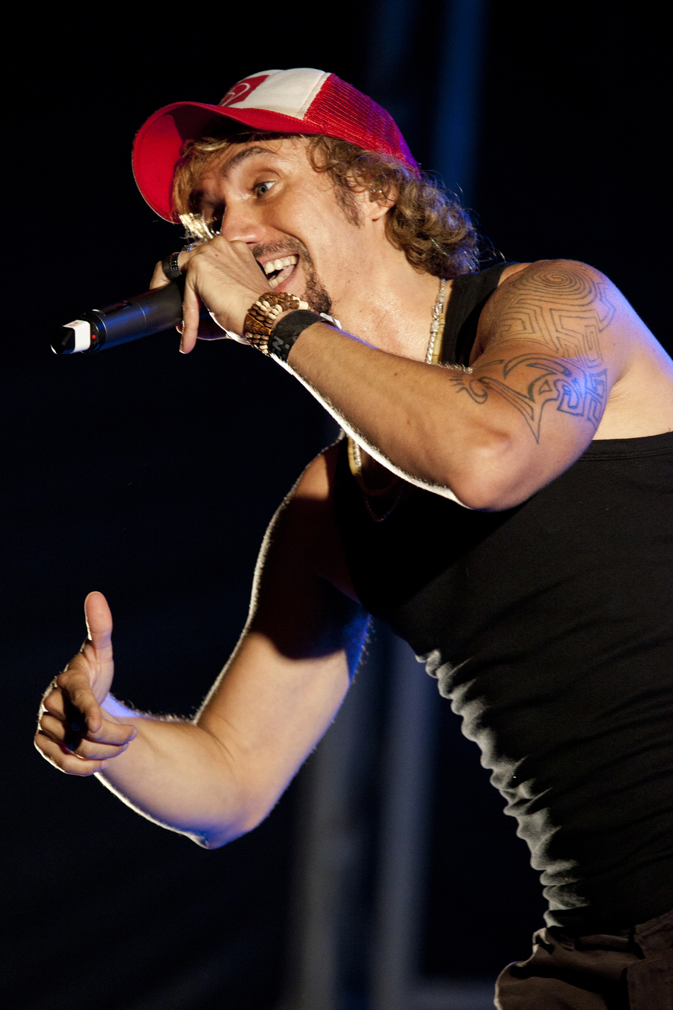 Macaco - Cruïlla BCN 2010